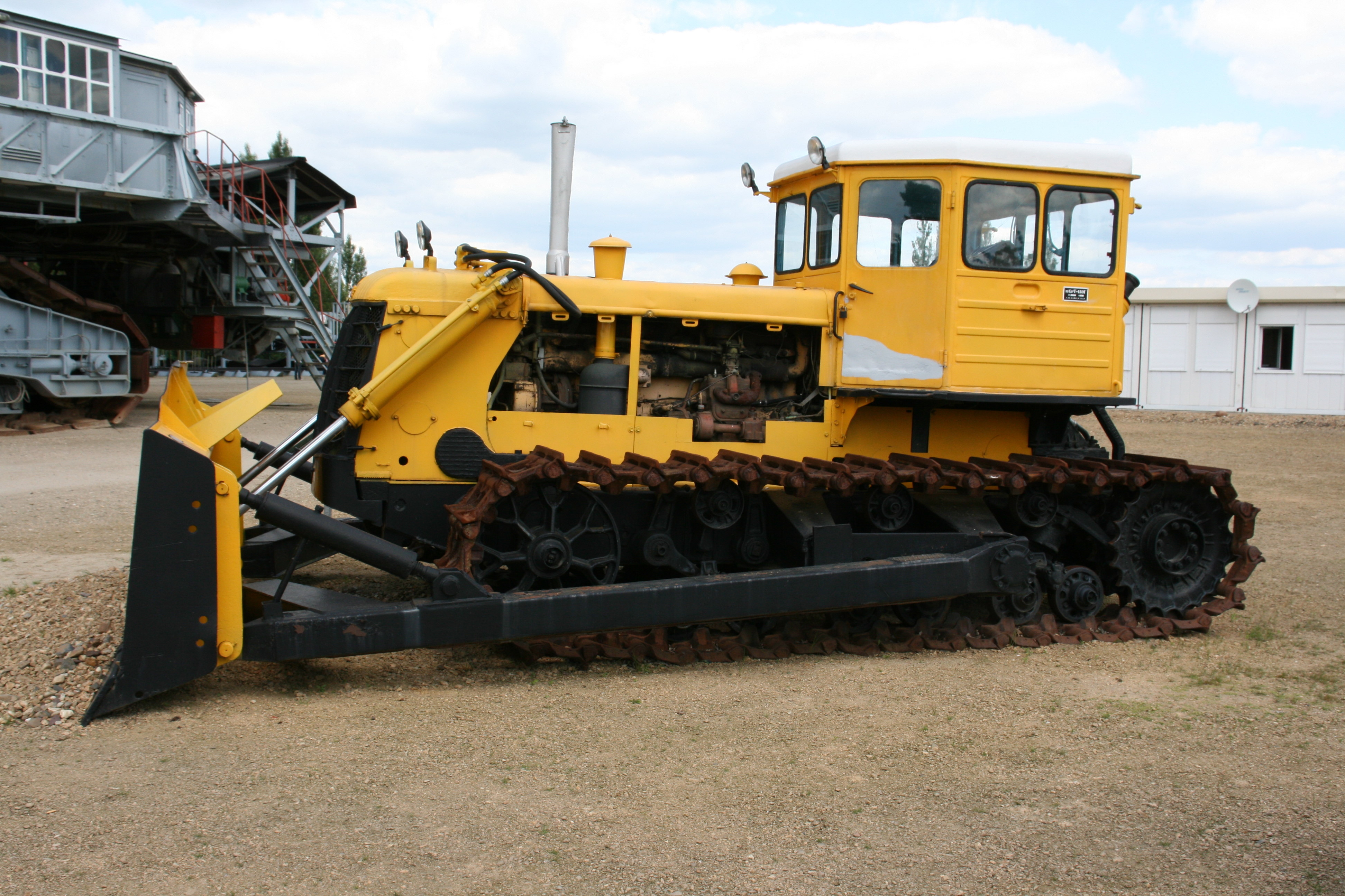 Raupe T 180 G im Museum “Bagger 1452”, Berzdorfer Straße 102 in Görlitz